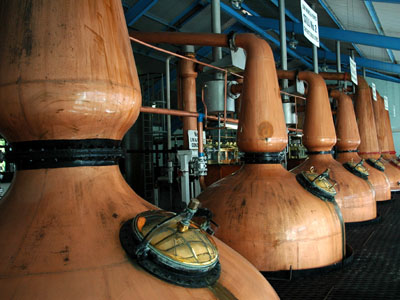 蘇格蘭，麥芽威士忌蒸餾廠，壺式蒸餾器 麥芽威威士忌(Malt Whisky)在製造上與所謂穀物威士忌(Grain Whisky)最不同的地方（參考：蘇格蘭威士忌的分類），就是使用形狀有點類似巨大茶壺的壺式蒸餾器(Pot Still)來將發酵完成的酒汁蒸餾成高酒精度的烈酒。 圖中所見為艾拉島威士忌蒸餾廠拉弗格(Laphroaig)酒廠所屬的七具壺式蒸餾器，注意到前景的四具蒸餾器與遠方的三具在瓶頸上方的冷凝器部分，形狀有點不大相同，這主要是因為遠處的三具蒸餾器是用來蒸餾發酵酒汁(Wash)的酒汁蒸餾器(Wash Still)，而近處的四具則是蒸餾初級烈酒(Low Wine)用的烈酒蒸餾器(Spirits Still)，在功能上有所不同！ 本圖片由上傳者User:SElephant拍攝於2004年8月。